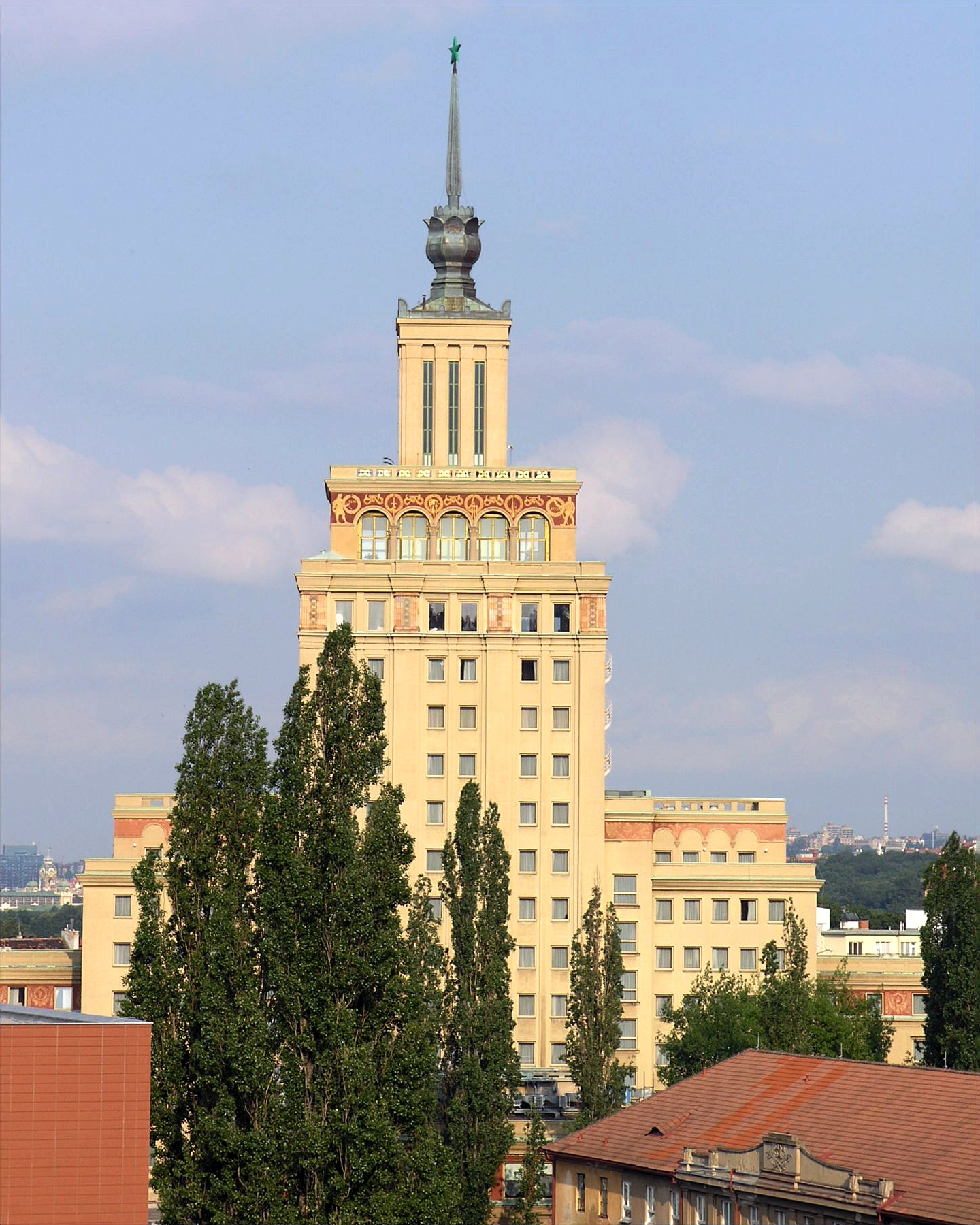 Hotel Crowne Plaza Prague, Praha-Dejvice